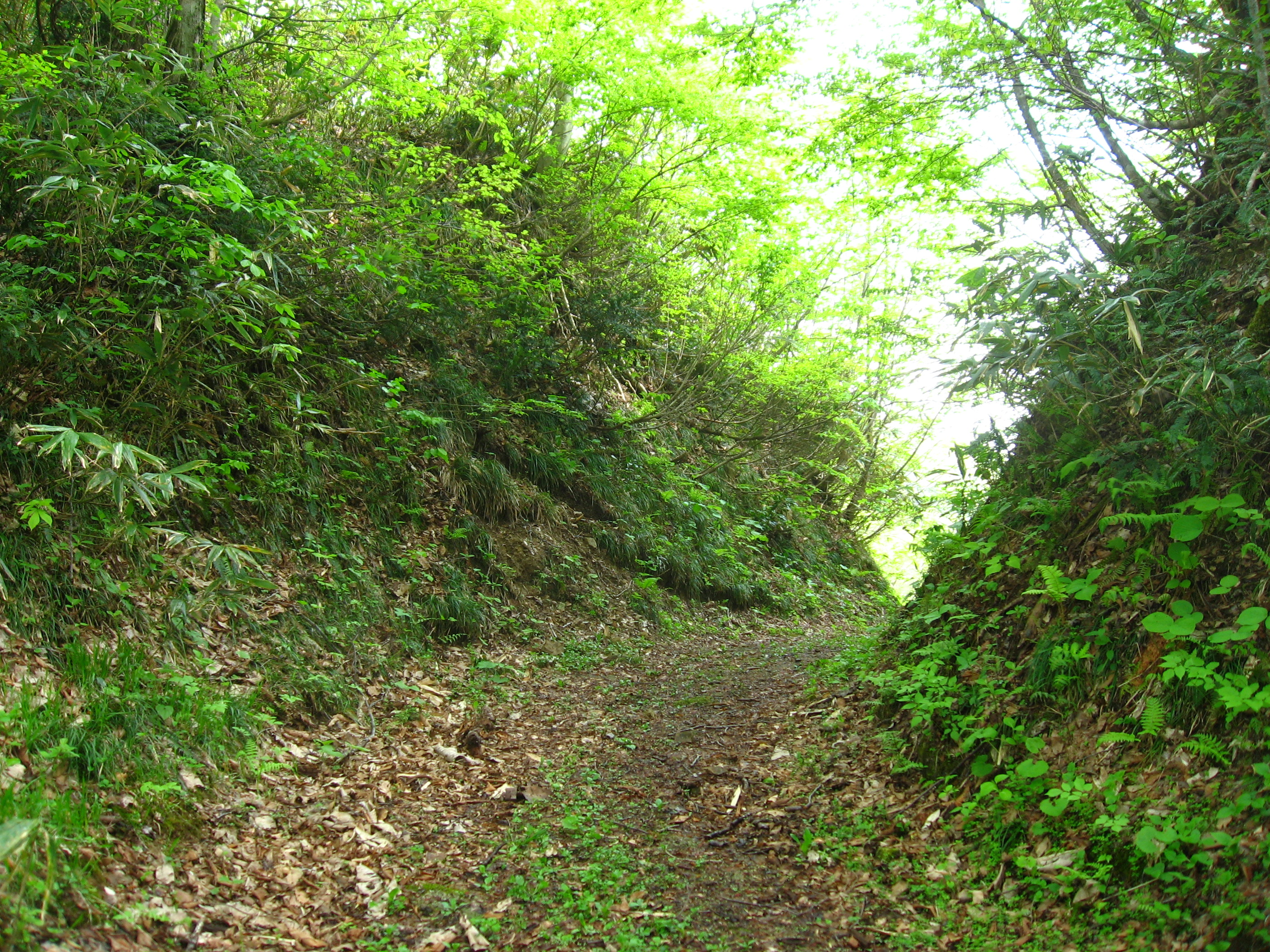 下野街道大内峠